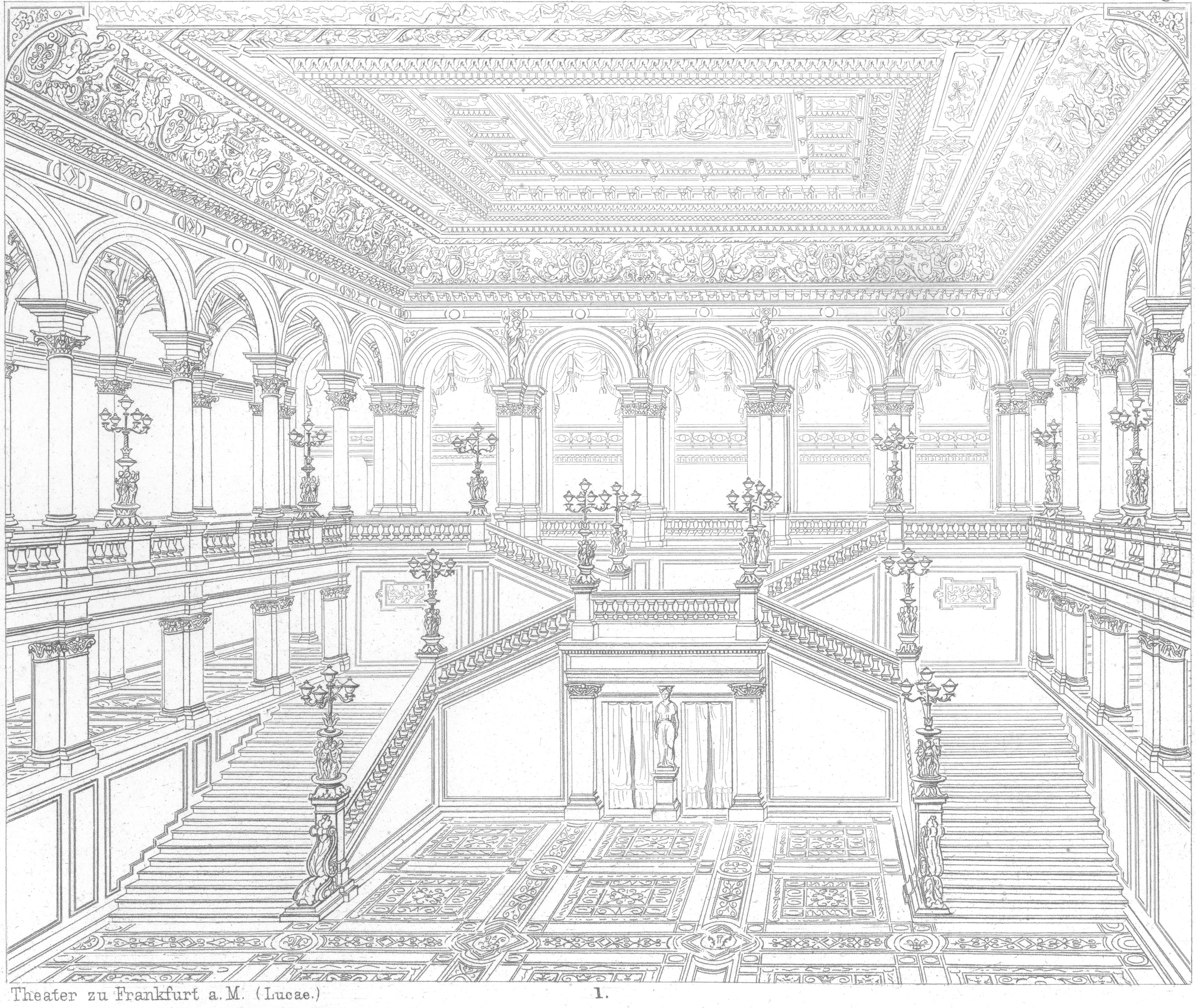 Theater in Frankfurt am Main (Alte Oper, Opernhaus am ehemaligen Bockenheimer Tor, jetzt Opernplatz), Treppenhaus, Architekt: Richard Lucae